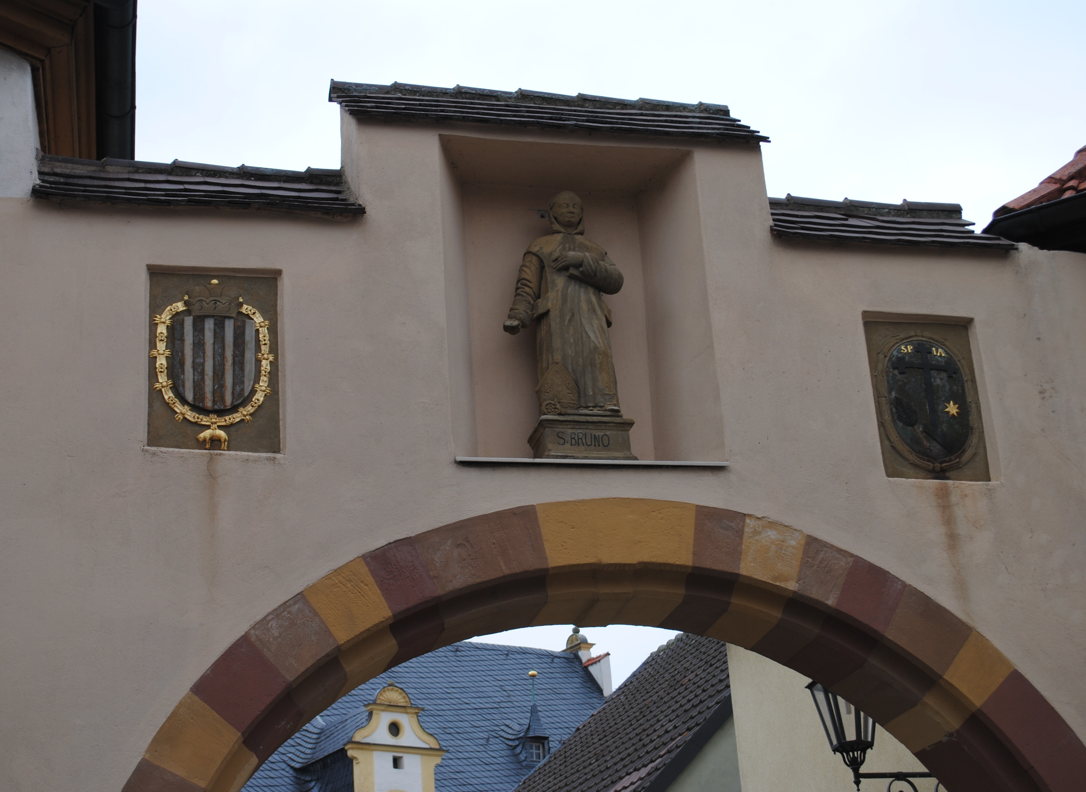 Hl. Bruno, Wappen, Kartause Astheim, Volkach